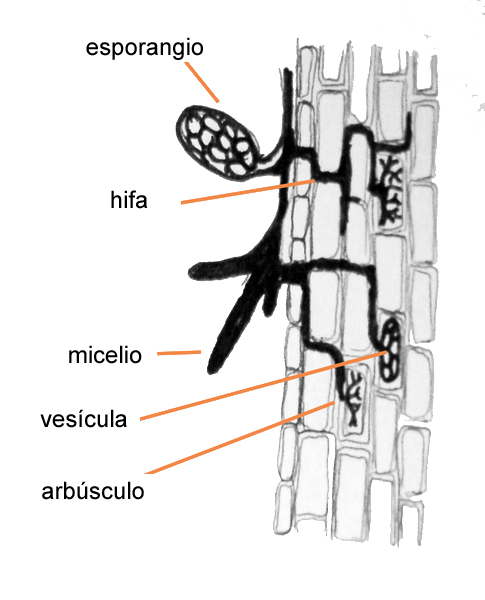 Arbuscular mycorriza.